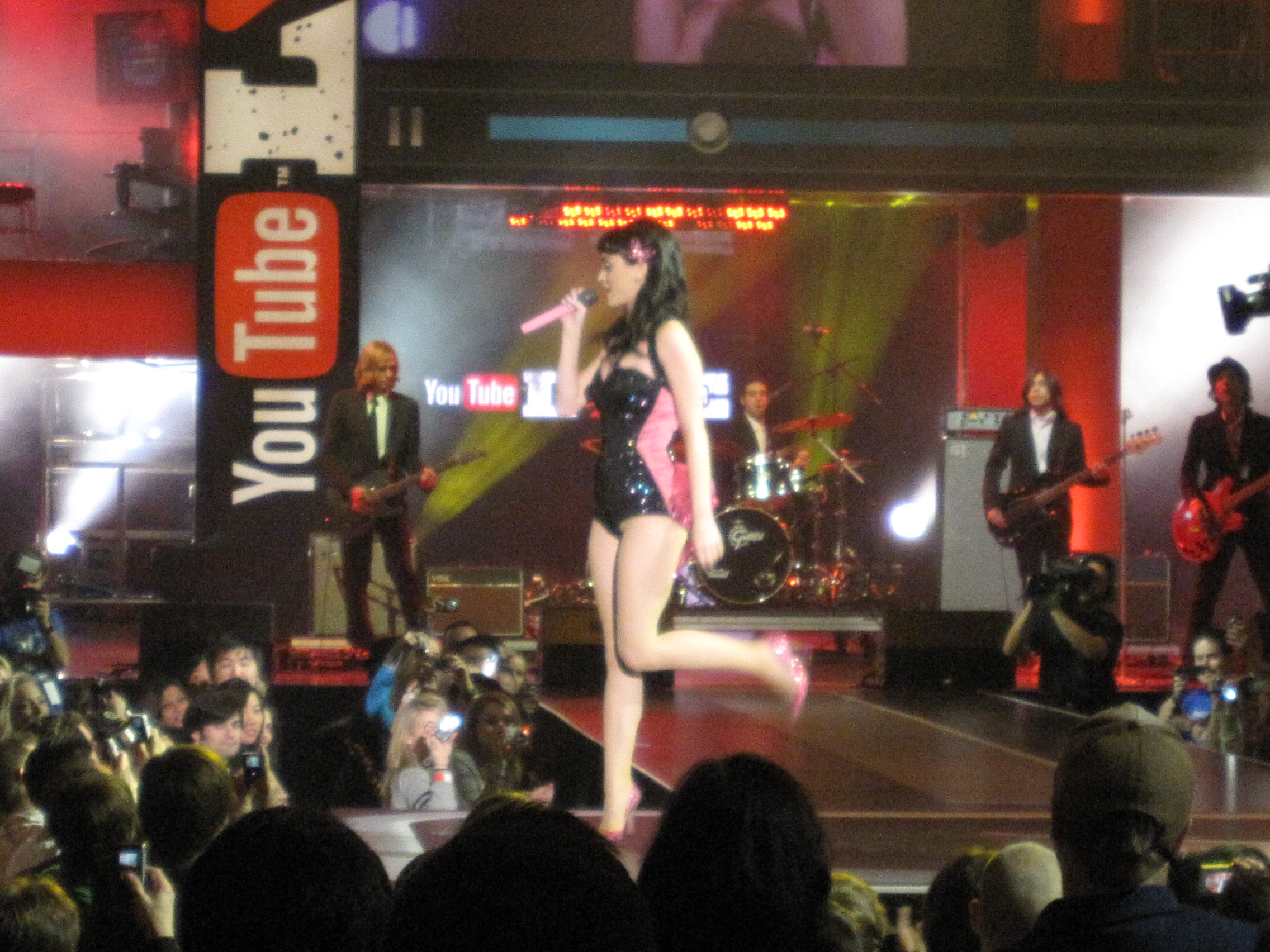 Katy Perry bei einem Auftritt (2008)